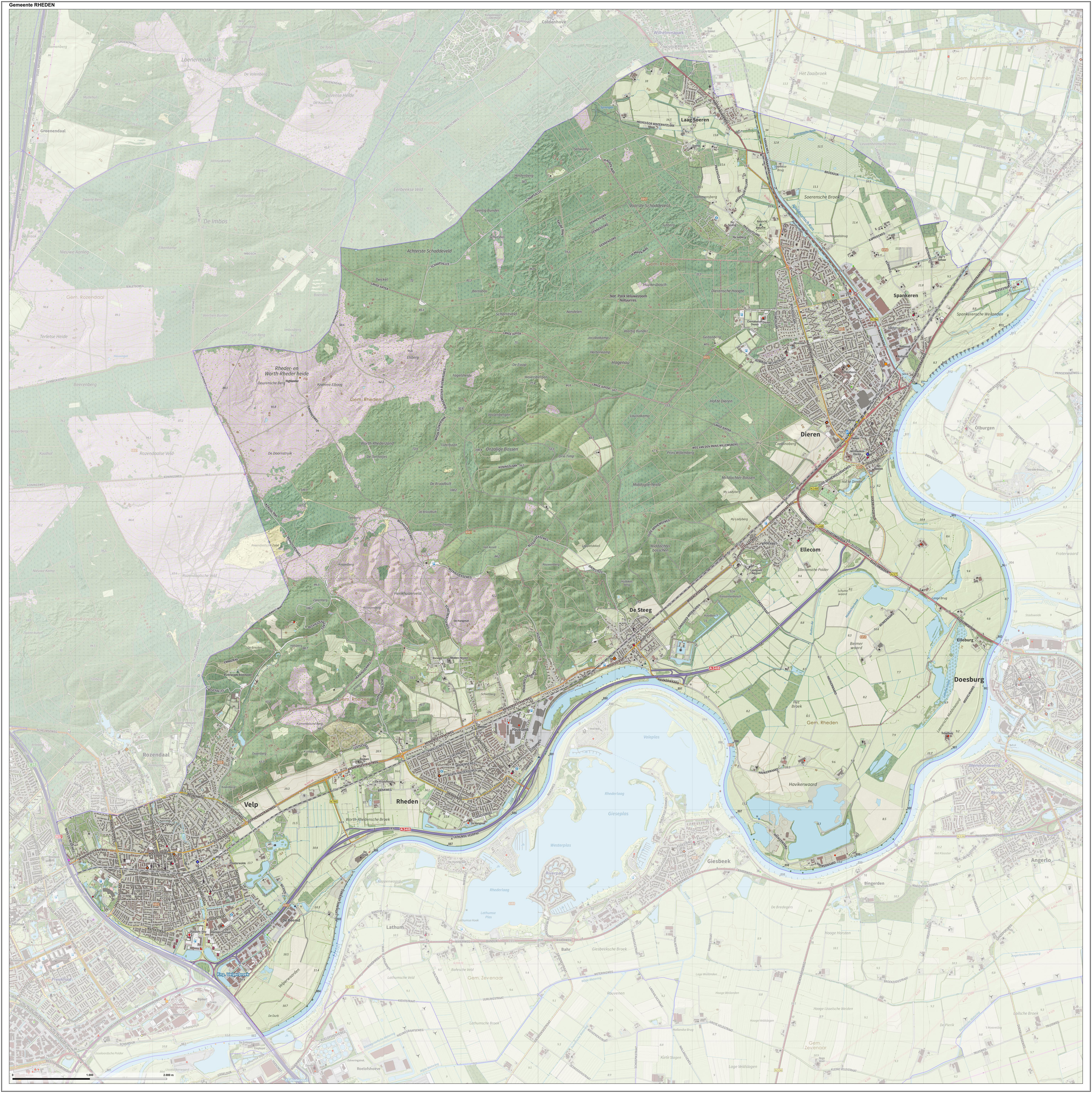 Topografische gemeentekaart. Resolutie: 400 pixels/km. Kaartbeeld samengesteld uit de open geodata van de Top10NL en Top25namen (Kadaster), Creative Commons-BY licentie. Gebouwvlakken uit open geodata BAG extract. Wegen uit de OpenStreetMap, OpenStreetMap community. Reliëfschaduw uit de Actuele Hoogtekaart AHN2. Samenstelling en kleurenschema: Jan-Willem van Aalst, met QGIS. Zie ook de Legenda.